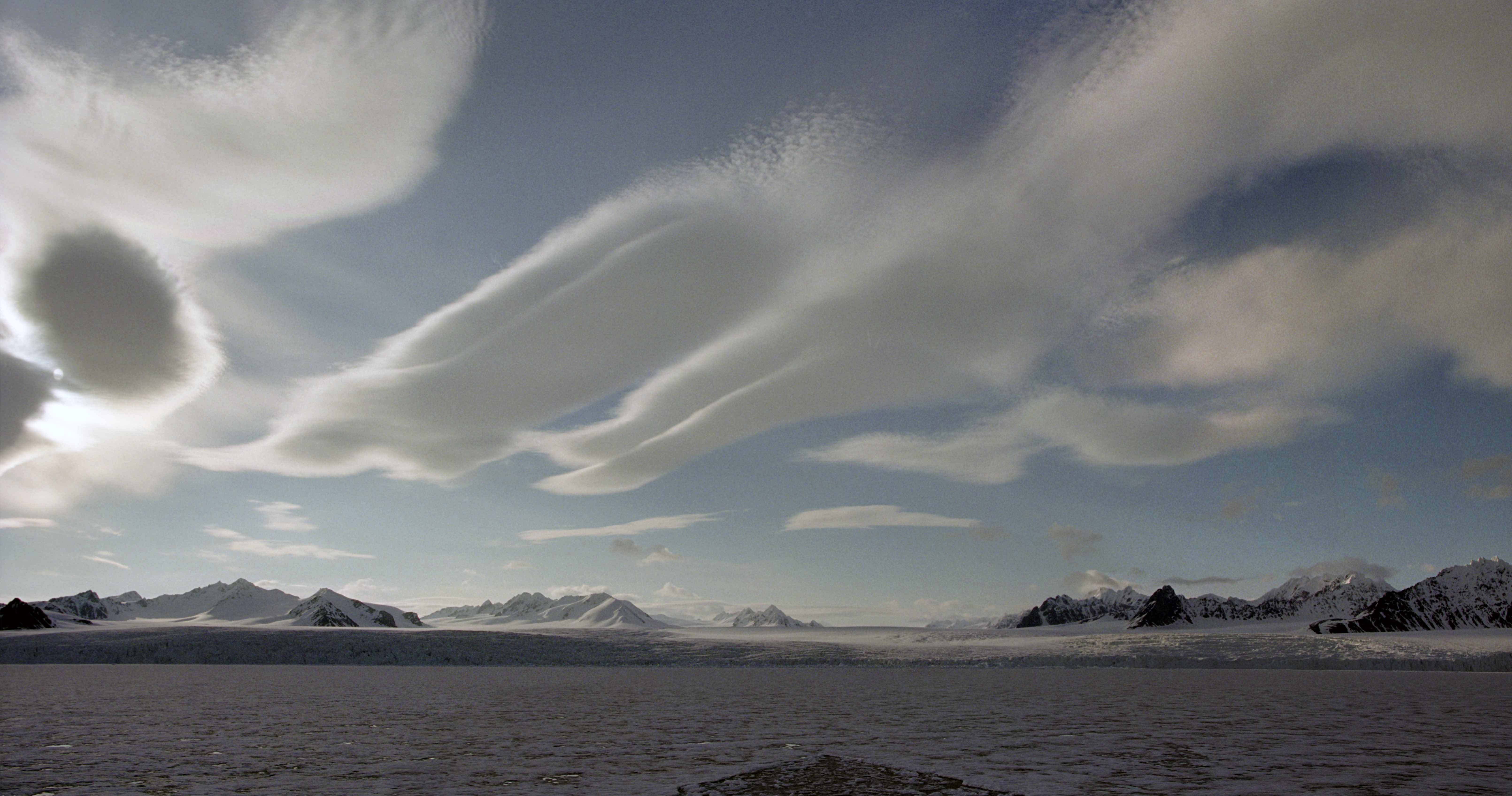 Svalbard, Lilliehookbreen